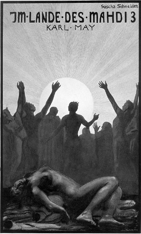 Buchdeckel des Romans Im Lande des Mahdi III von Karl May. Ausgabe von 1905, gestaltet von Sascha Schneider.